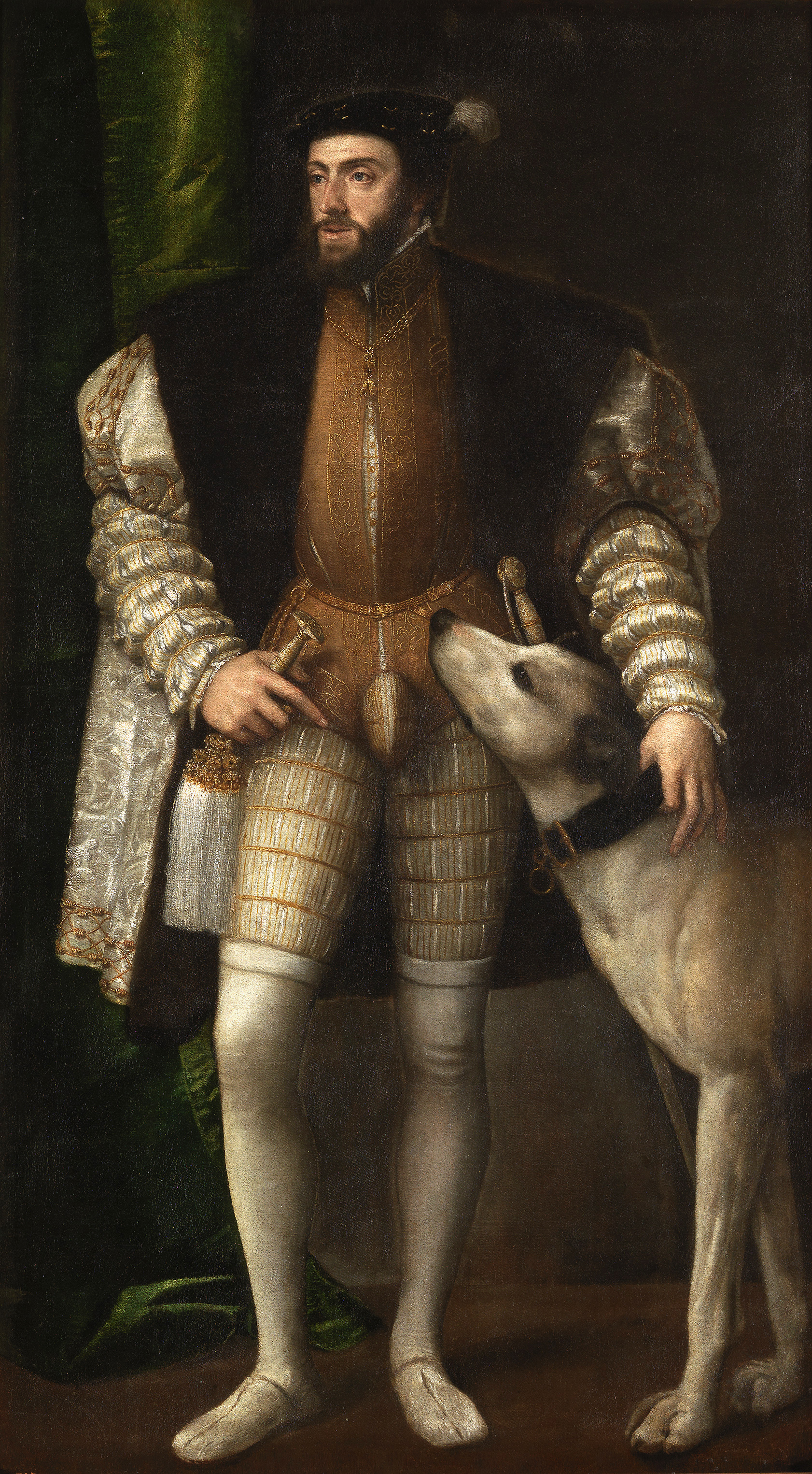 Retrato del emperador Carlos I de España (1500-1558), que aparece representado de cuerpo entero y junto a un perro.